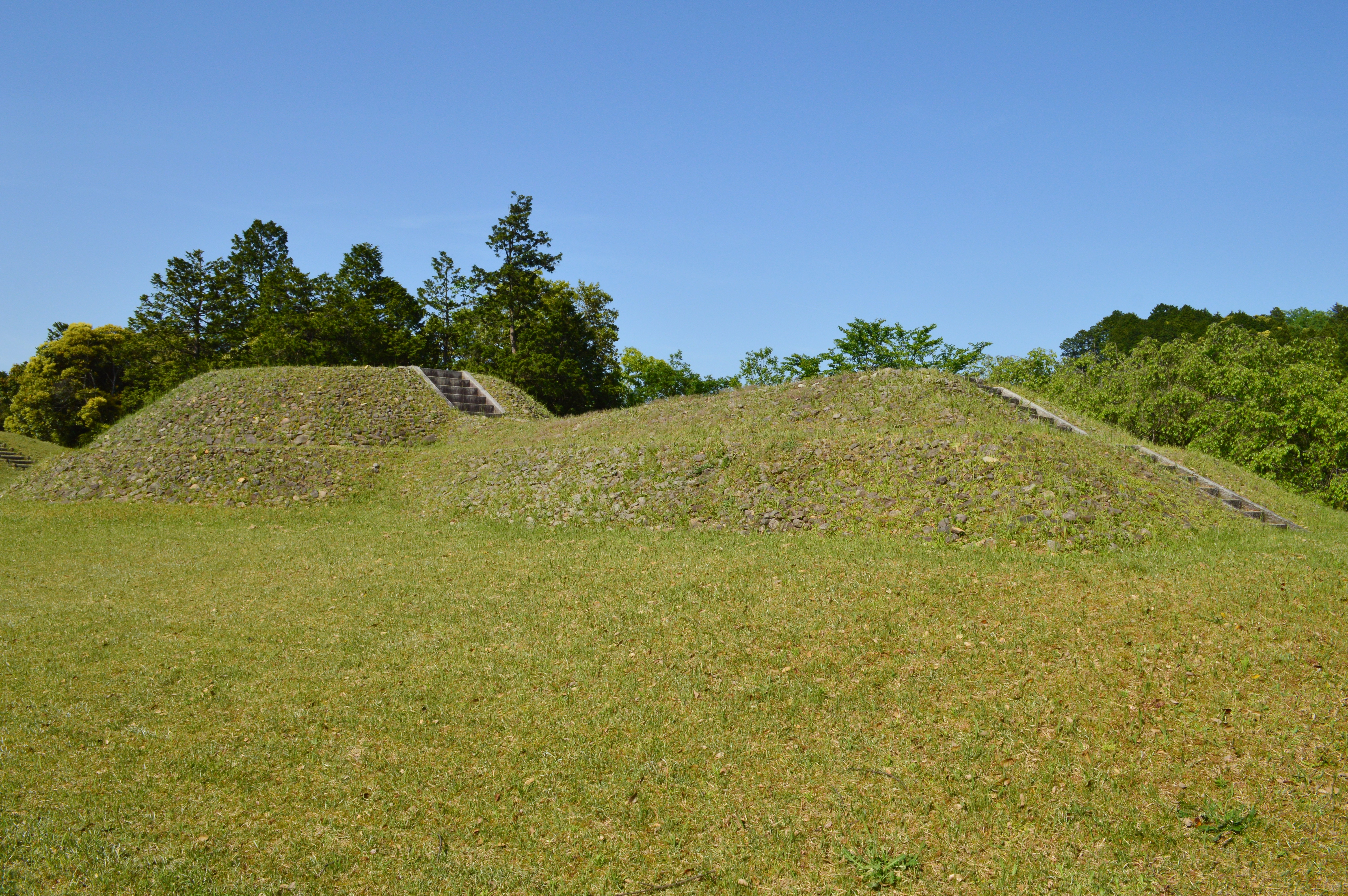 作山4号墳 墳丘全景